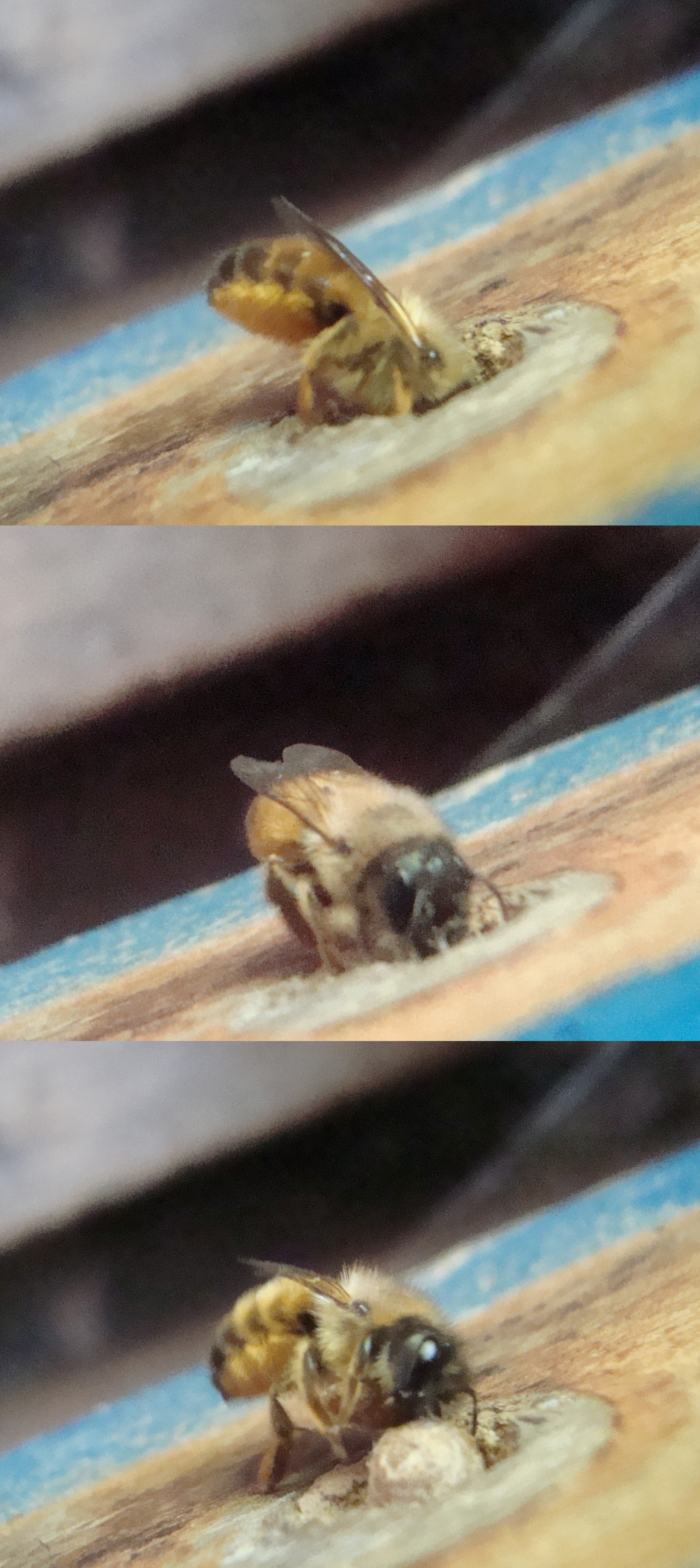 Samotářská včela zednice rezavá z Podkomorských lesů, Česká republika, jižní Morava